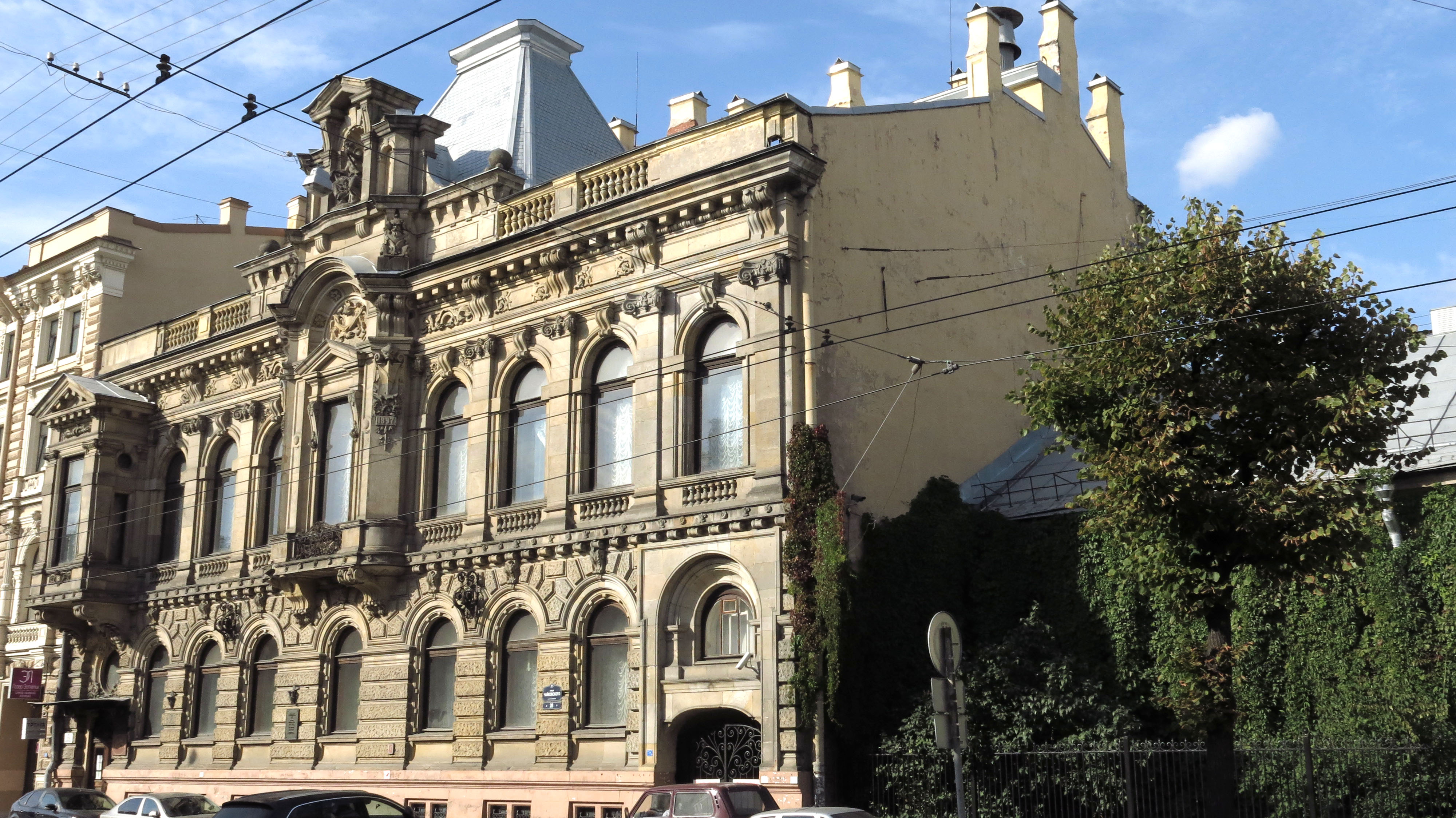 Особняк Кельха А. Ф. (Александрова И. М.) с дворовыми флигелями (Санкт-Петербург и Лен.область, Санкт-Петербург, Чайковского улица, 28)